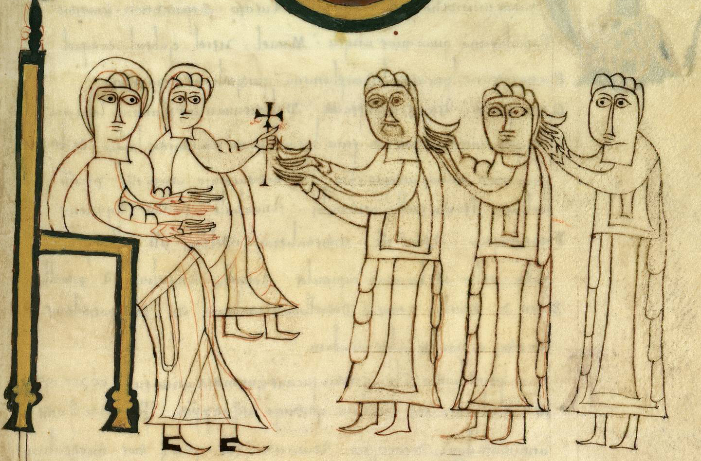 Detalle de la Adoración de los Reyes Magos del Folio 206 recto del Códice de Roda, conservado en la Real Academia de la Historia (España), siglo X-XI, 232 folios (29 x 21 cm) en pergamino. Escritura visigótica.